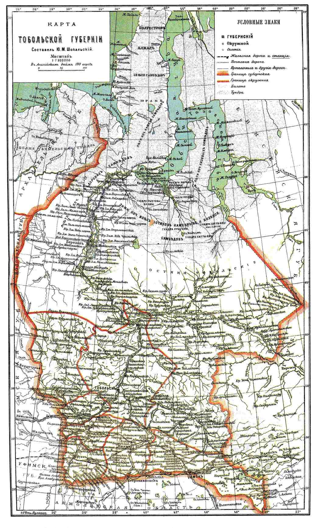 Карта Тобольской губернии.